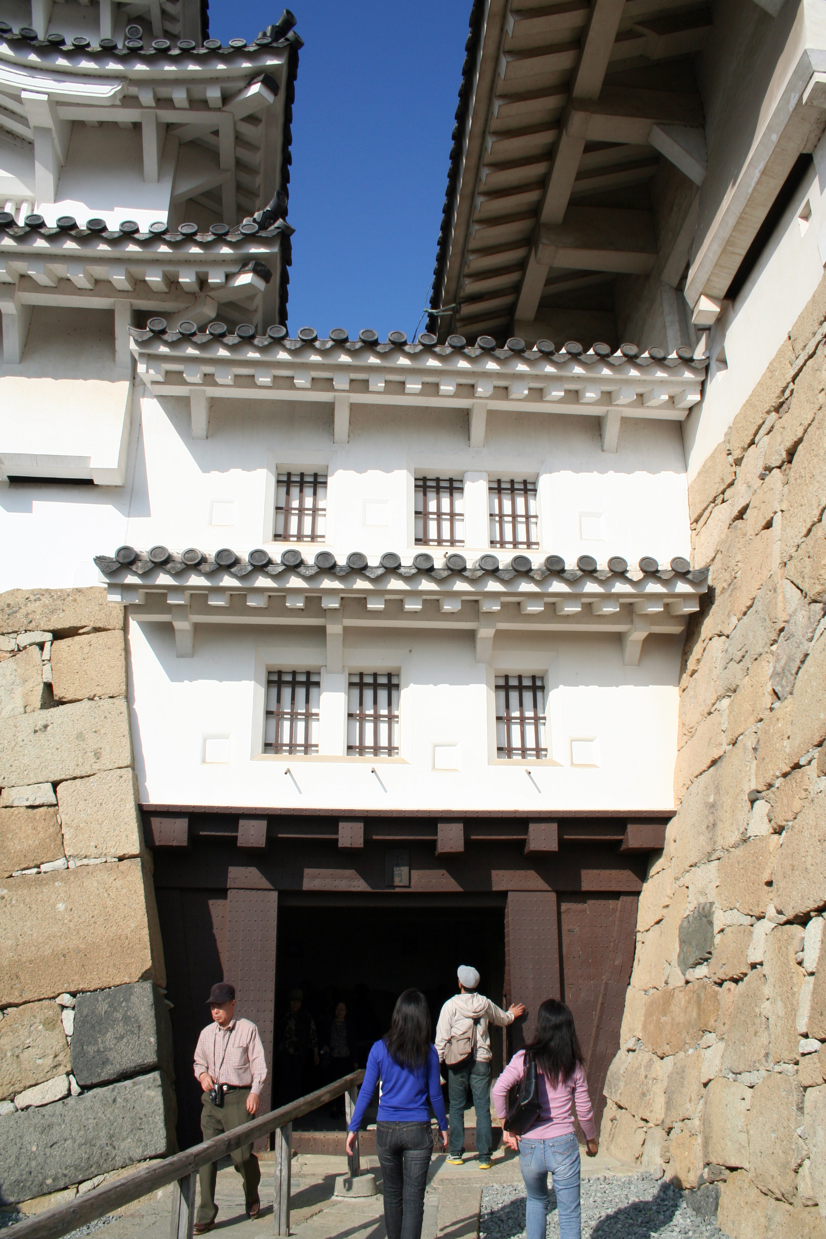 2009年秋の姫路城。 水五門。